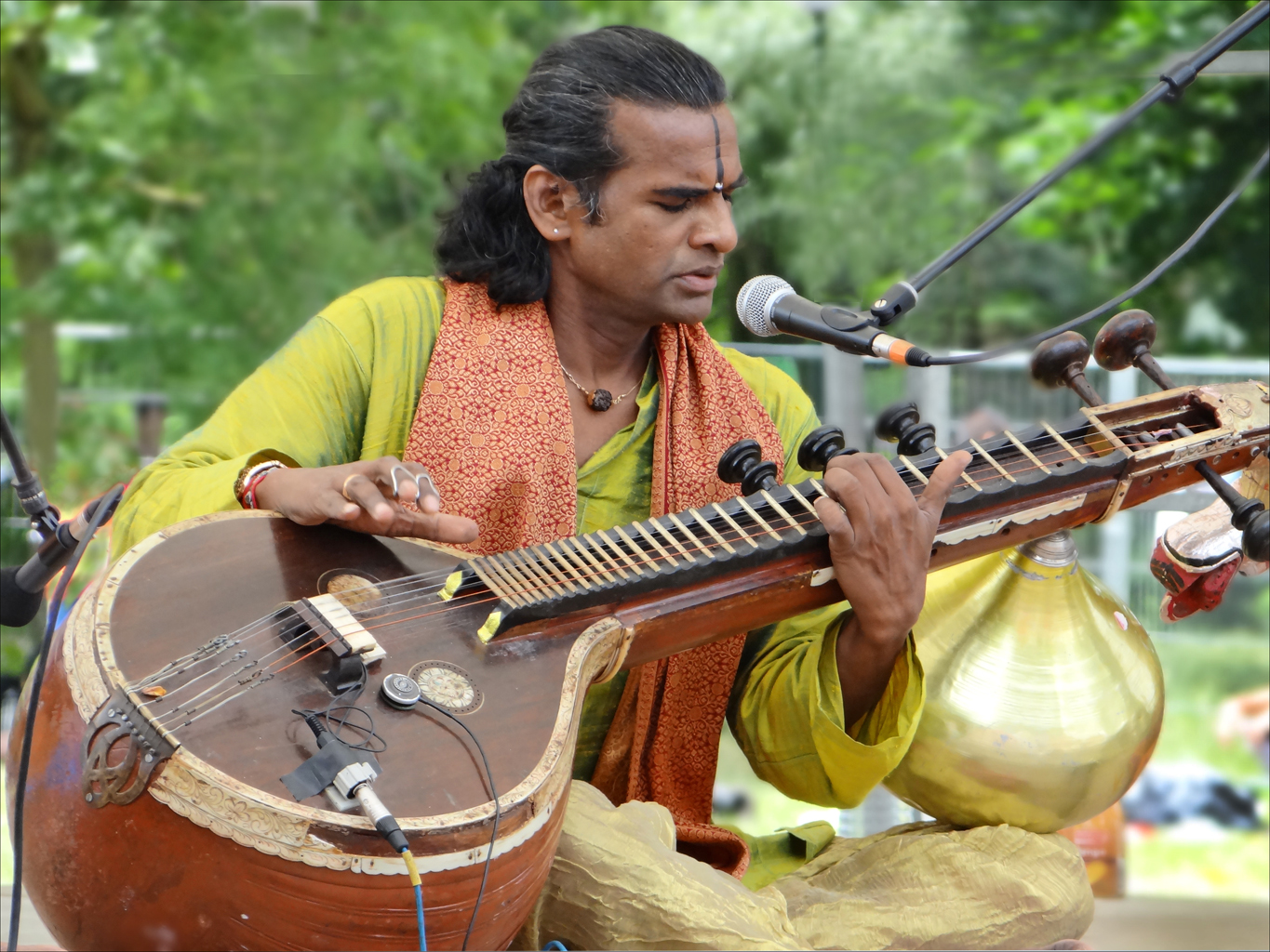 concert de Raghunath Manet à la veena site de l'artiste 12e Festival culturel du Tibet et des peuples de l’Himalaya